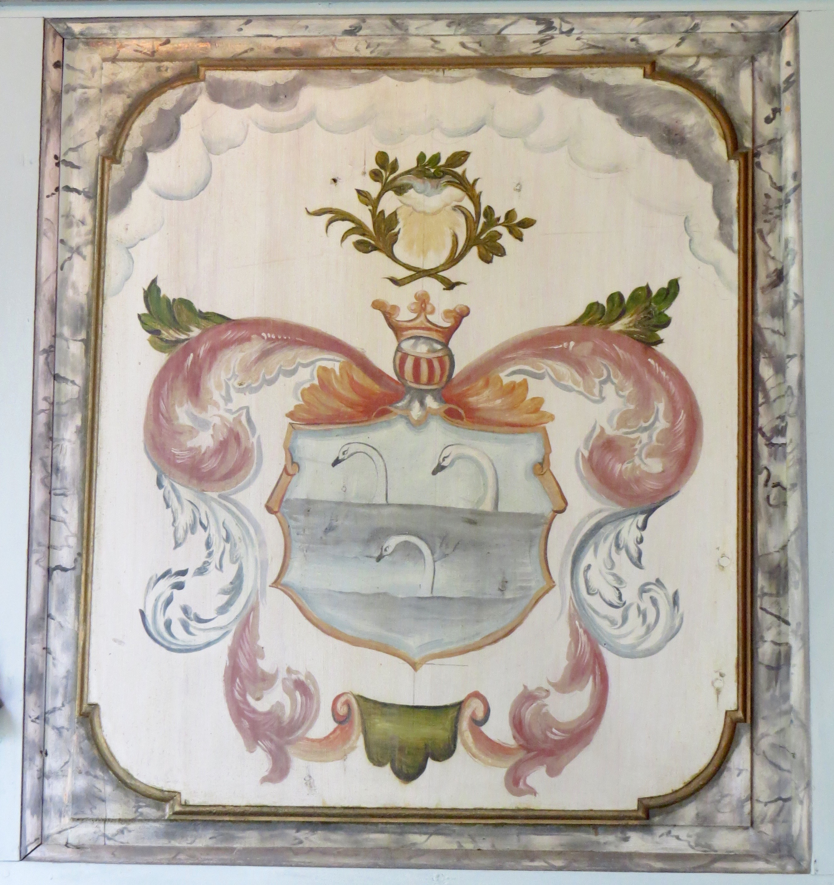 Våben tilhørende Juliane Ernestine de Cicignon (1744—1799), Solum Kirke, Skien. Se: Hans Cappelen: «Talende våpenskjold», Varden 2.7.1966